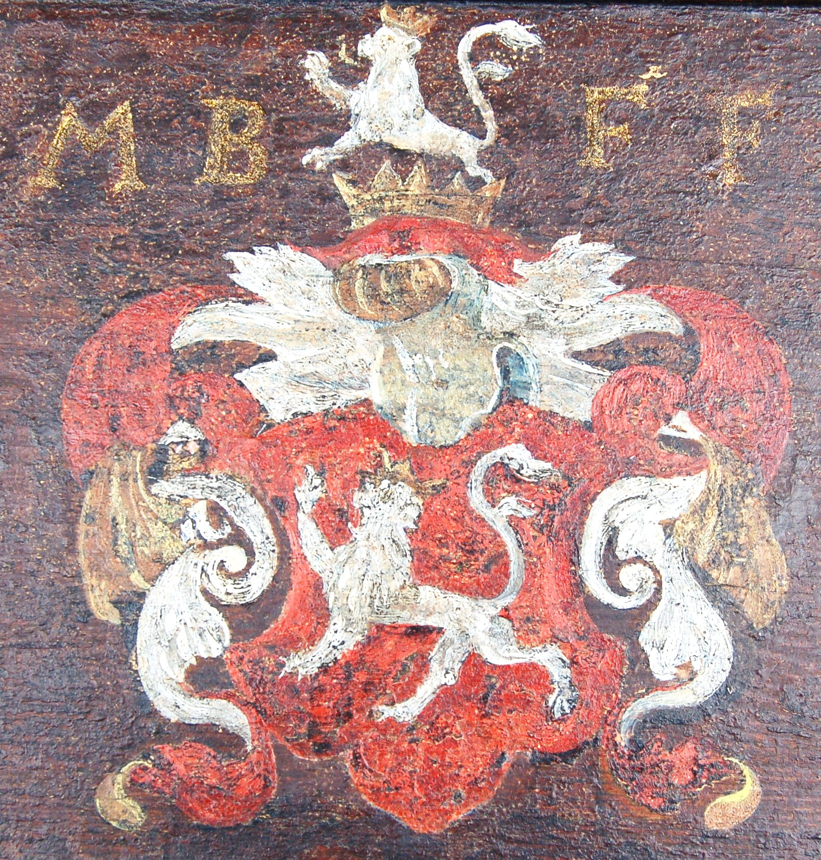 Våpenskjold Margrethe Breide i Tanum kirke, Larvik